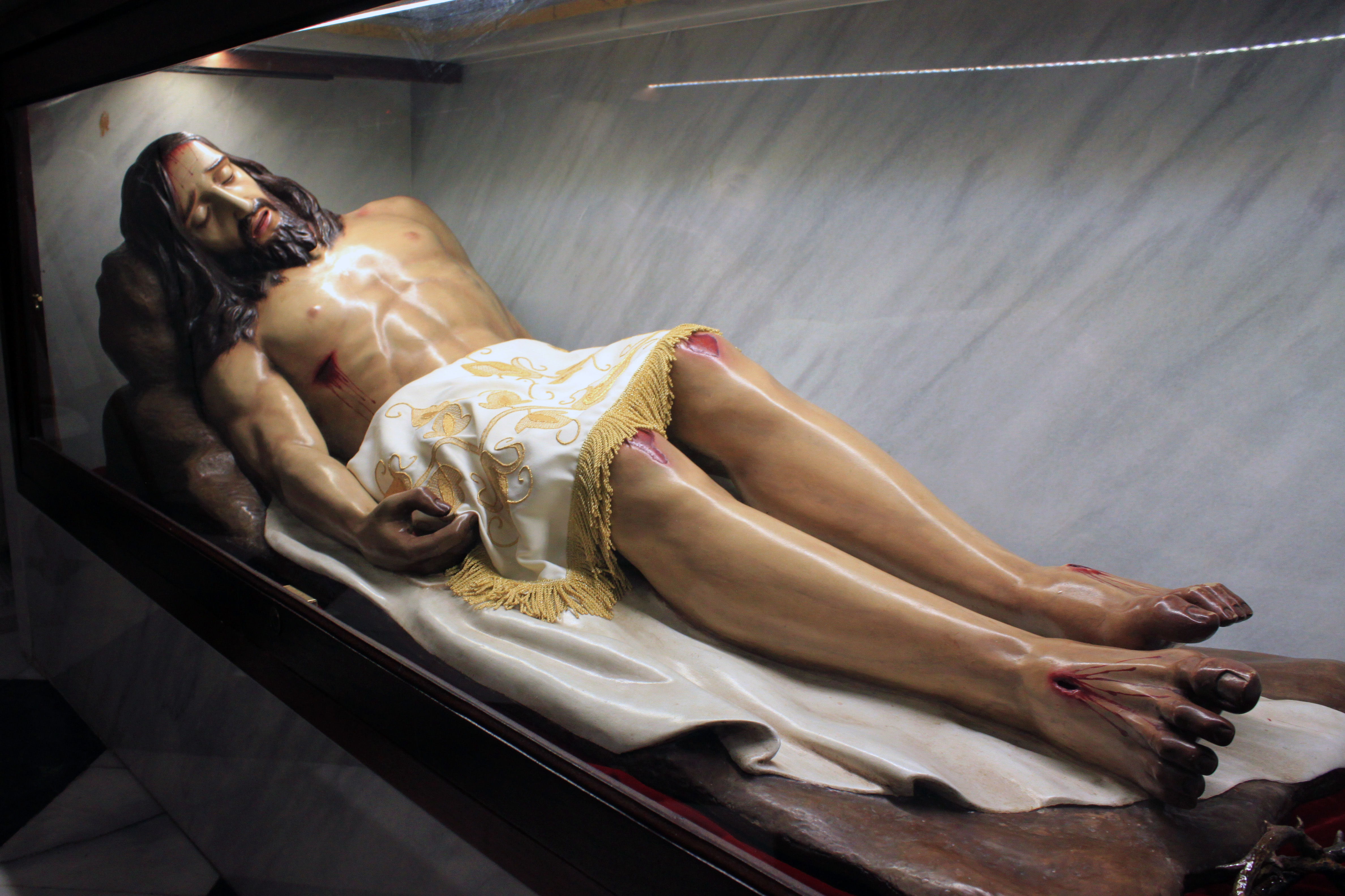 Imagen del Cristo Yacente del escultor algecireño José Román Corzanego de 1943 en el interior de la Iglesia de Nuestra Señora de la Palma de Algeciras, Andalucía, España.